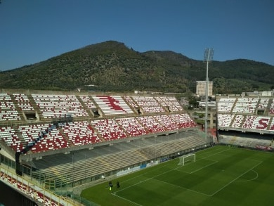 Stadio Arechi, 30 marzo 2019